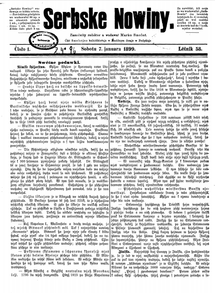 Титульный лист газеты Serbske Nowiny за 1 января 1899 года